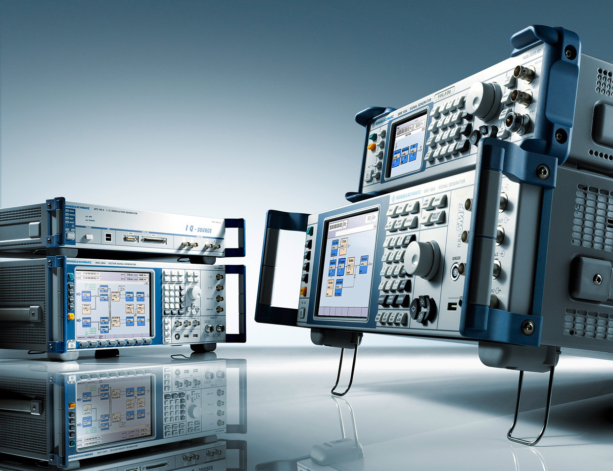 Signalgeneratoren R&S SMB, R&S SMF, R&S AFQ und R&S SMU der Firma Rohde & Schwarz